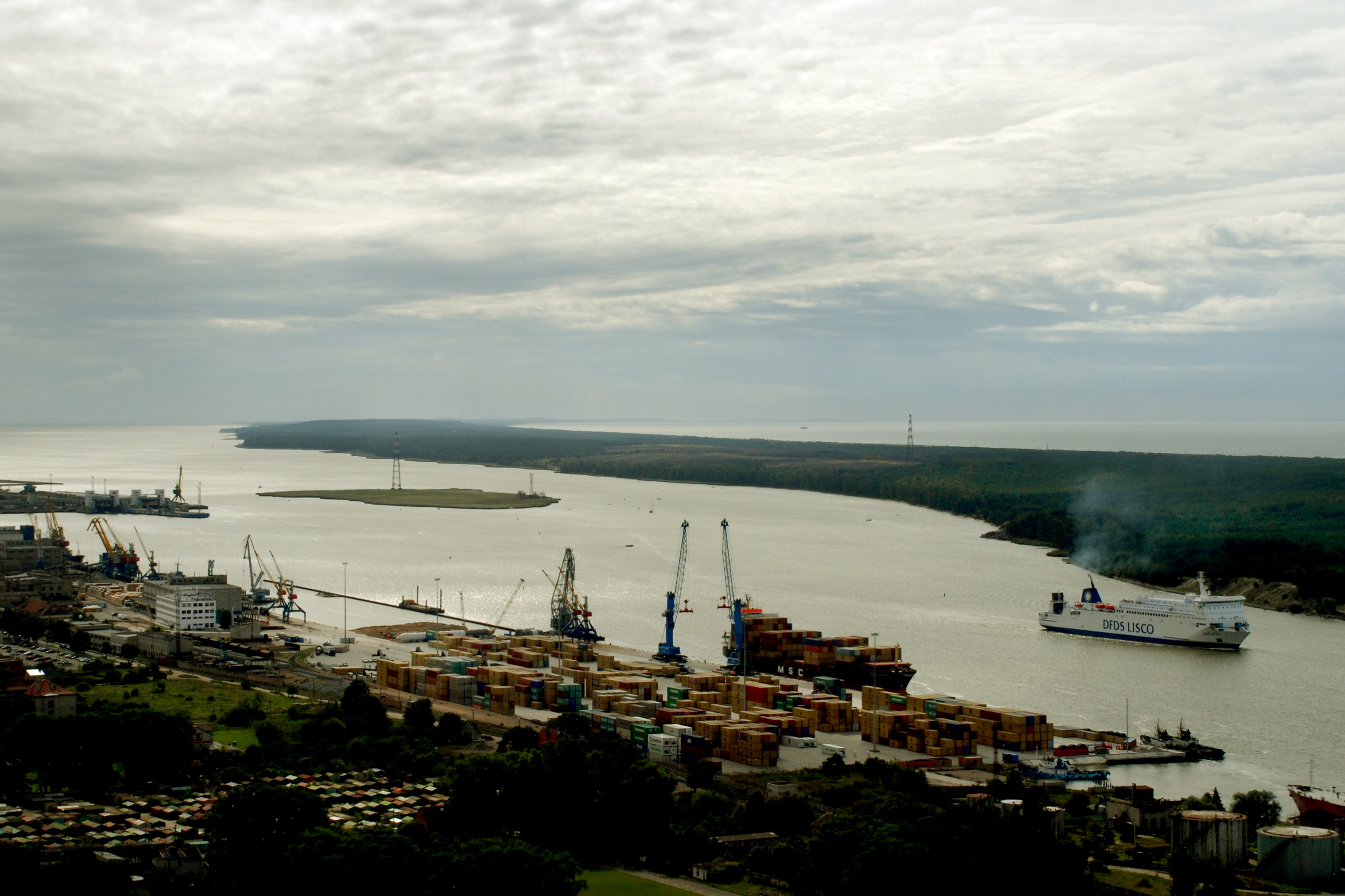 Ostrov Kiaulės Nugara v Kuršském zálivu ( v Klaipėdě). V zálivu, vlevo od něj je terminál trajektové přepravy, od kterého odplul v popředí viditelný trajekt DFDS LiSCo. Vlevo za Kuršskou kosou je Baltské moře. Pohled z výškové budovy Gandrališkės směrem k jihojihozápadu